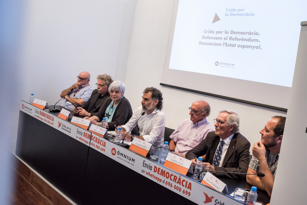 Presentem el nou projecte 'Crida per la Democràcia', una iniciativa que apel·la tots els demòcrates i que va molt més enllà de l'entitat.